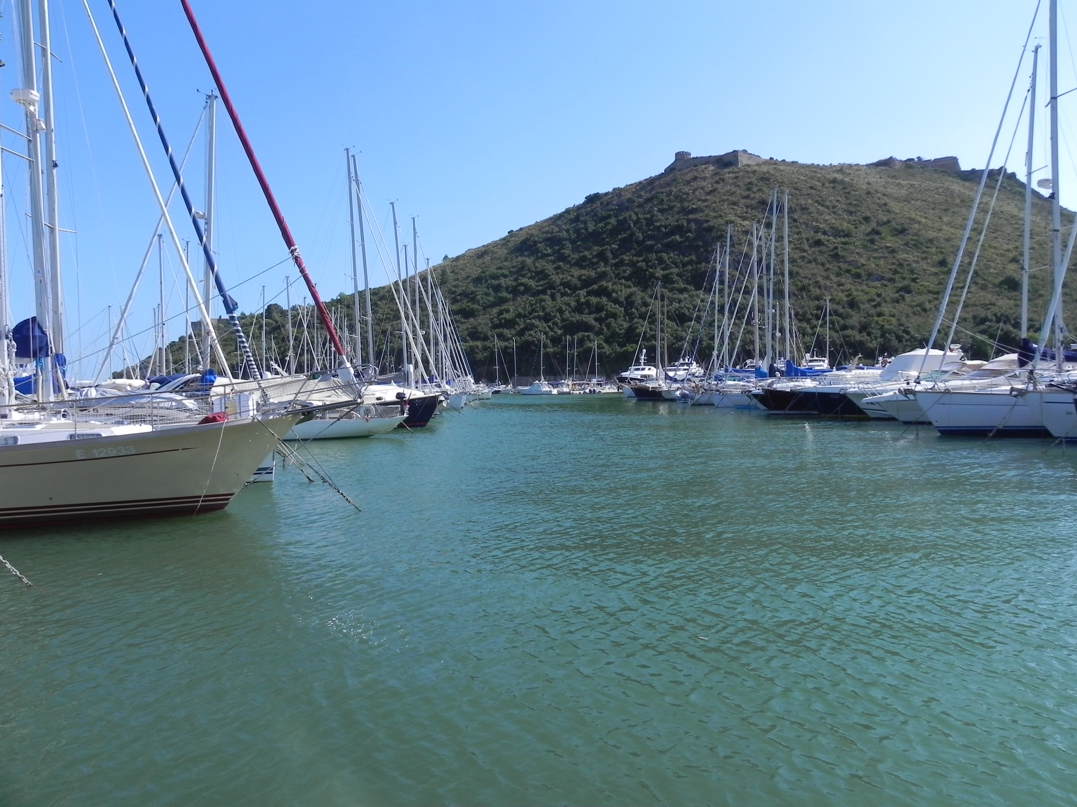 Bacino interno del porto di Cala Galera.